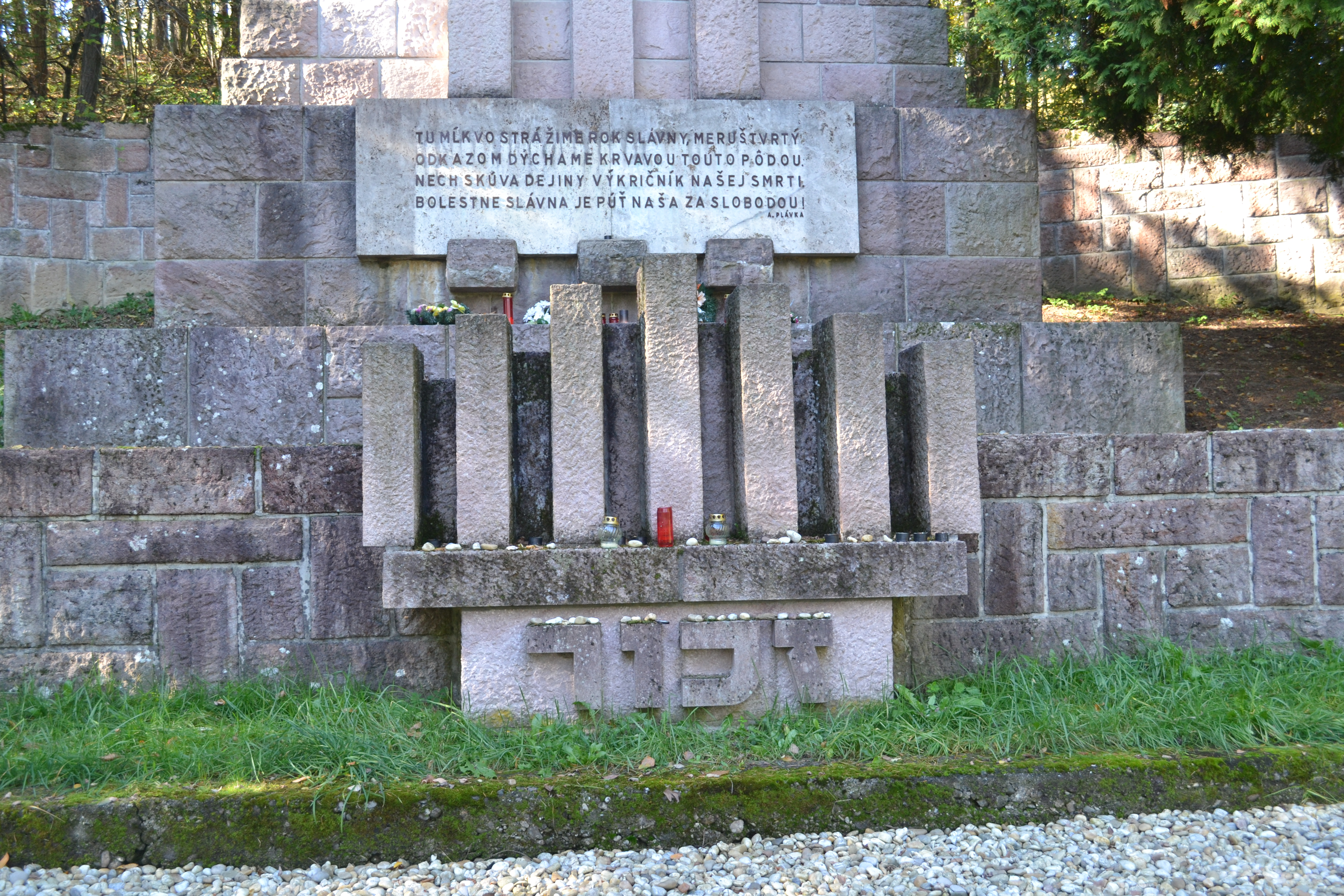 Detail na súčasť Pamätníka obetiam fašizmu v Kremničke - židovskú sviecu zvanú Menora od slovensko-izraelského architekta Juraja Arieha Fatrana. V spodnej časti je nápis v hebrejčine - Zachor (Pamätaj)